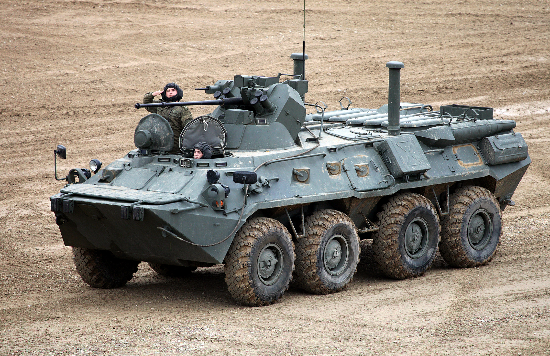 Бронетранспортер БТР-82А (BTR-82A armored personnel carrier)